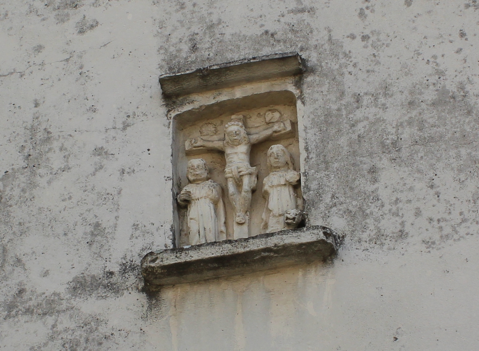 Calvaire mural sculpté à Marault (Bologne (Haute-Marne))